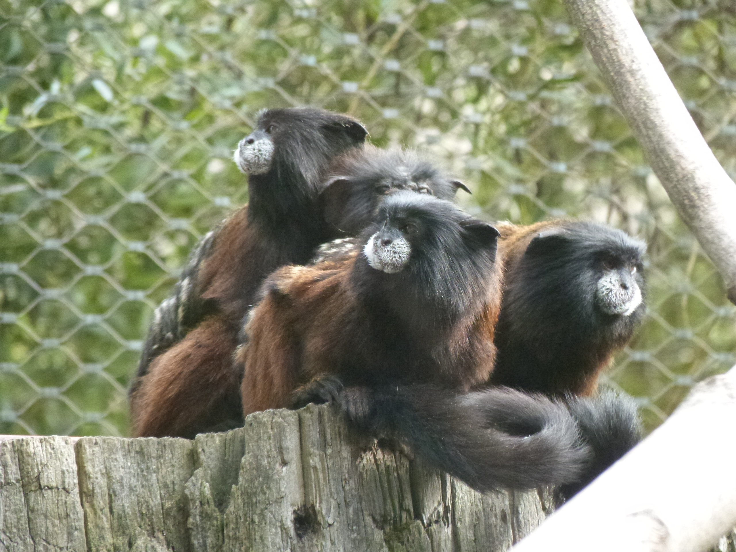 Saguinus fuscicollis - Braunrückentamarine im Zoo Halle (Saale)